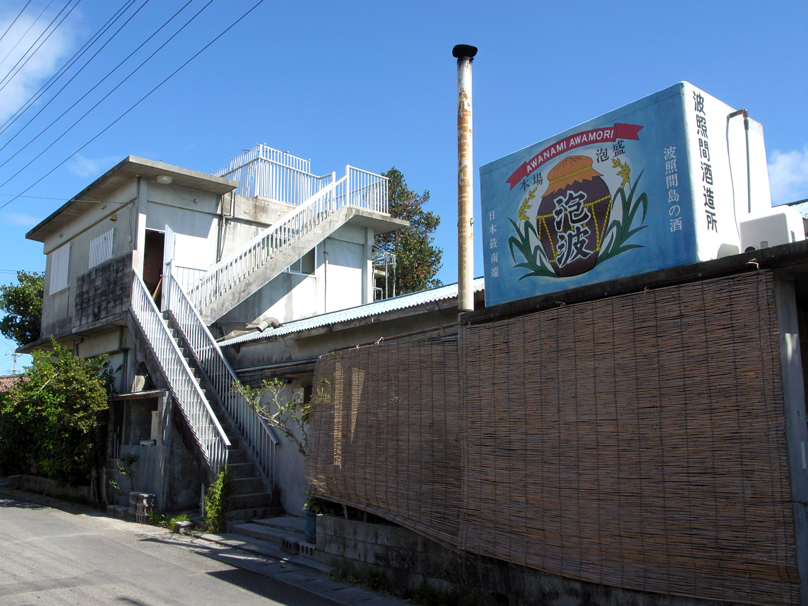 波照間酒造（沖縄県八重山郡竹富町波照間島）